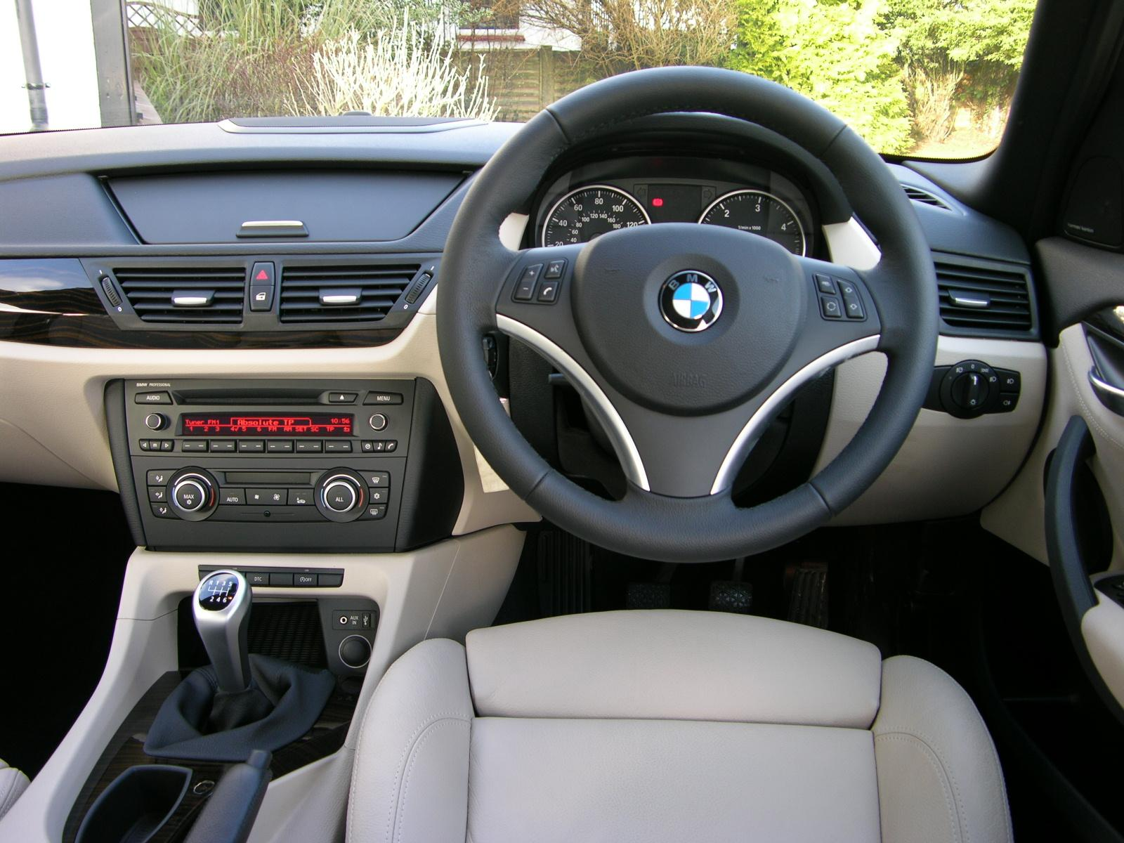 2010 BMW X1 sDrive 2.0d SE